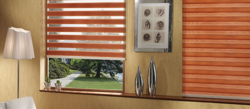 تصویری از پرده زبرا